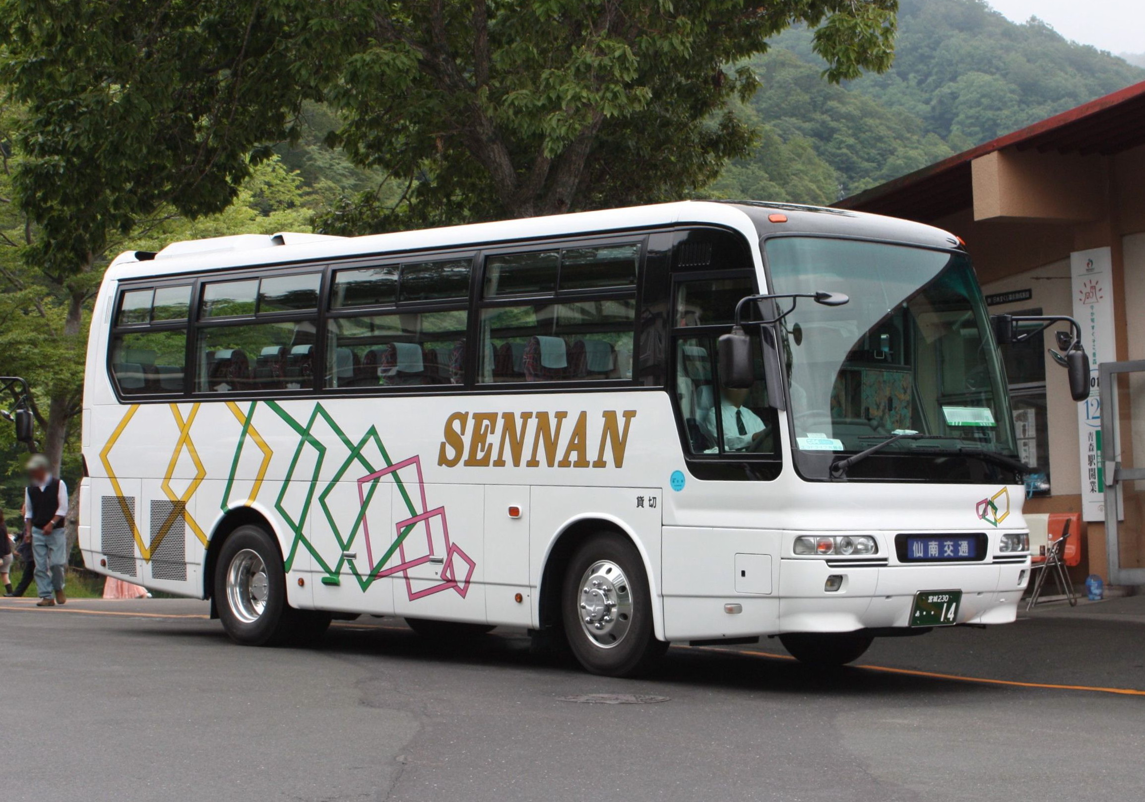 仙南交通 宮城230あ･･14 十和田湖付近にて